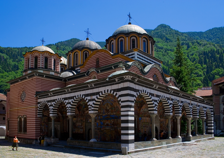 Рилски манастир